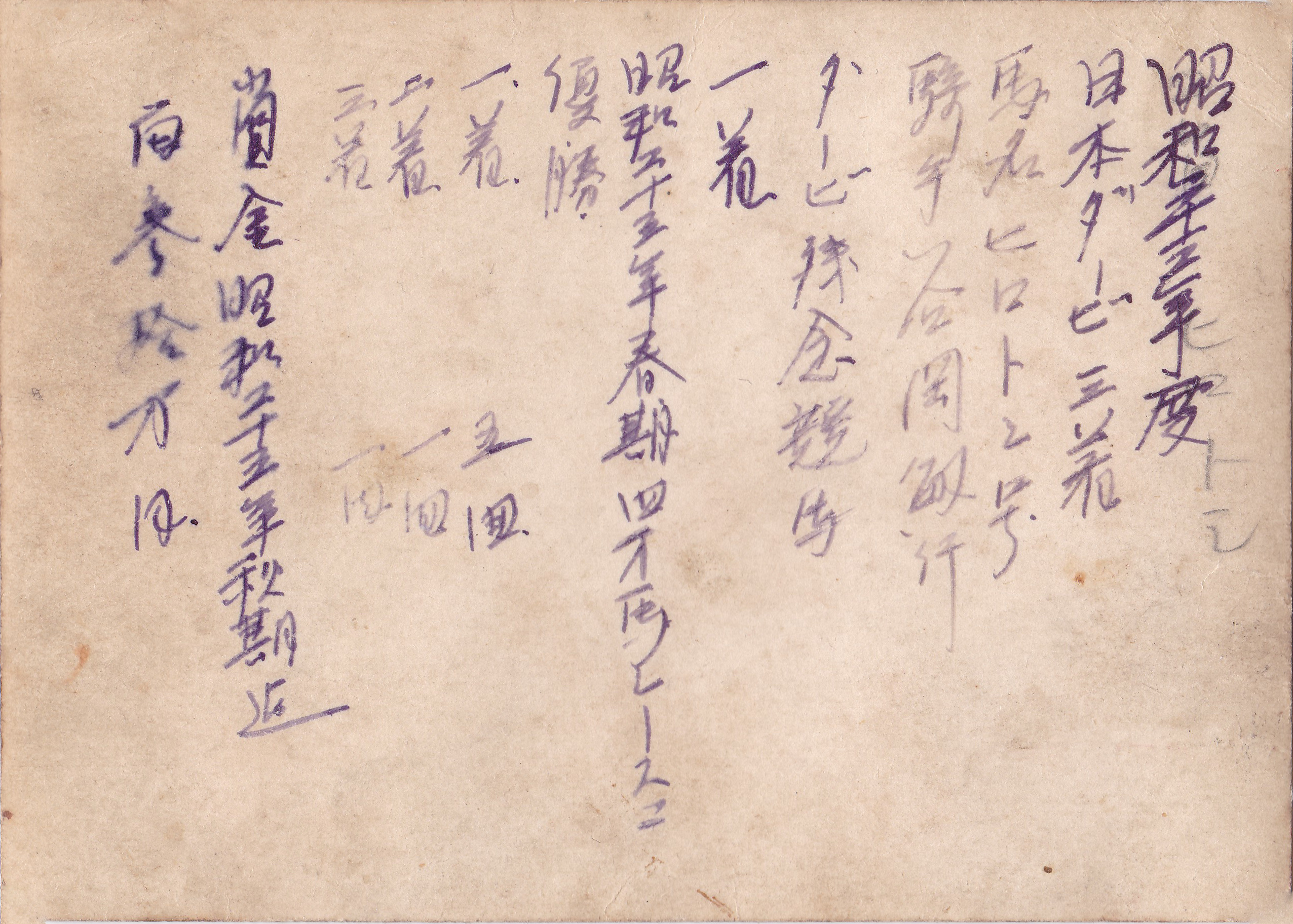 掲載の第15回日本ダービー写真裏面。没後66年が経過、本人競争データは数少ないが、この写真裏のように本人メモがかなりあり本欄キャリアを構成した。